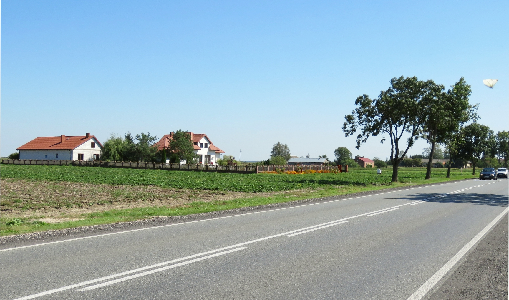 Emolinek